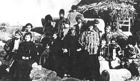 Дворянский передовой госпиталь (из Москвы) в Тавангоузе. В центре хирург княжна В.И.Гедройц. По фот. пор. В.Р.Апухтина. авт. "Нивы". 1905.*